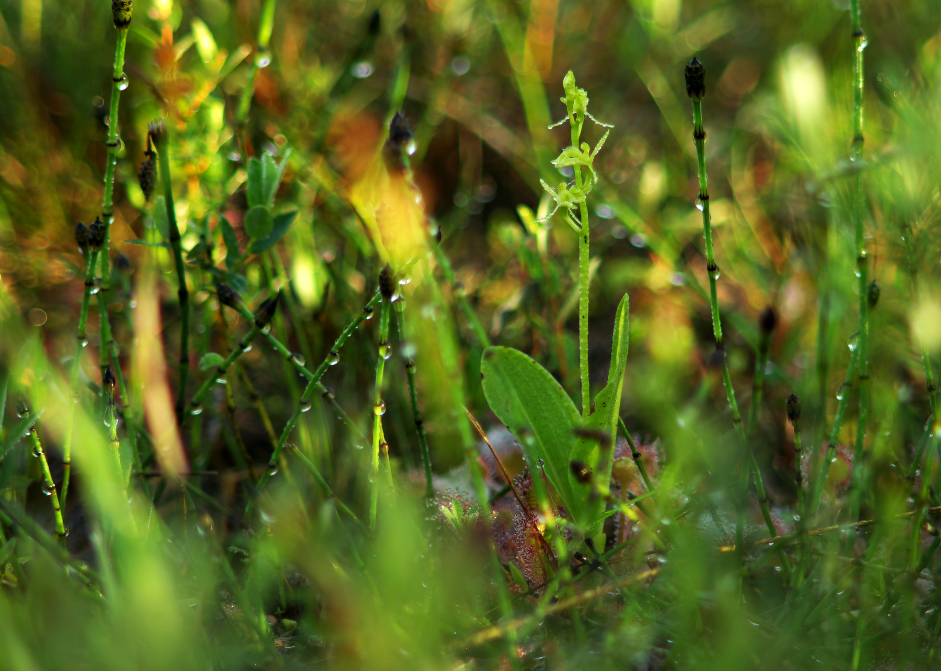 Lipiennik Loesela (Liparis loeselii)